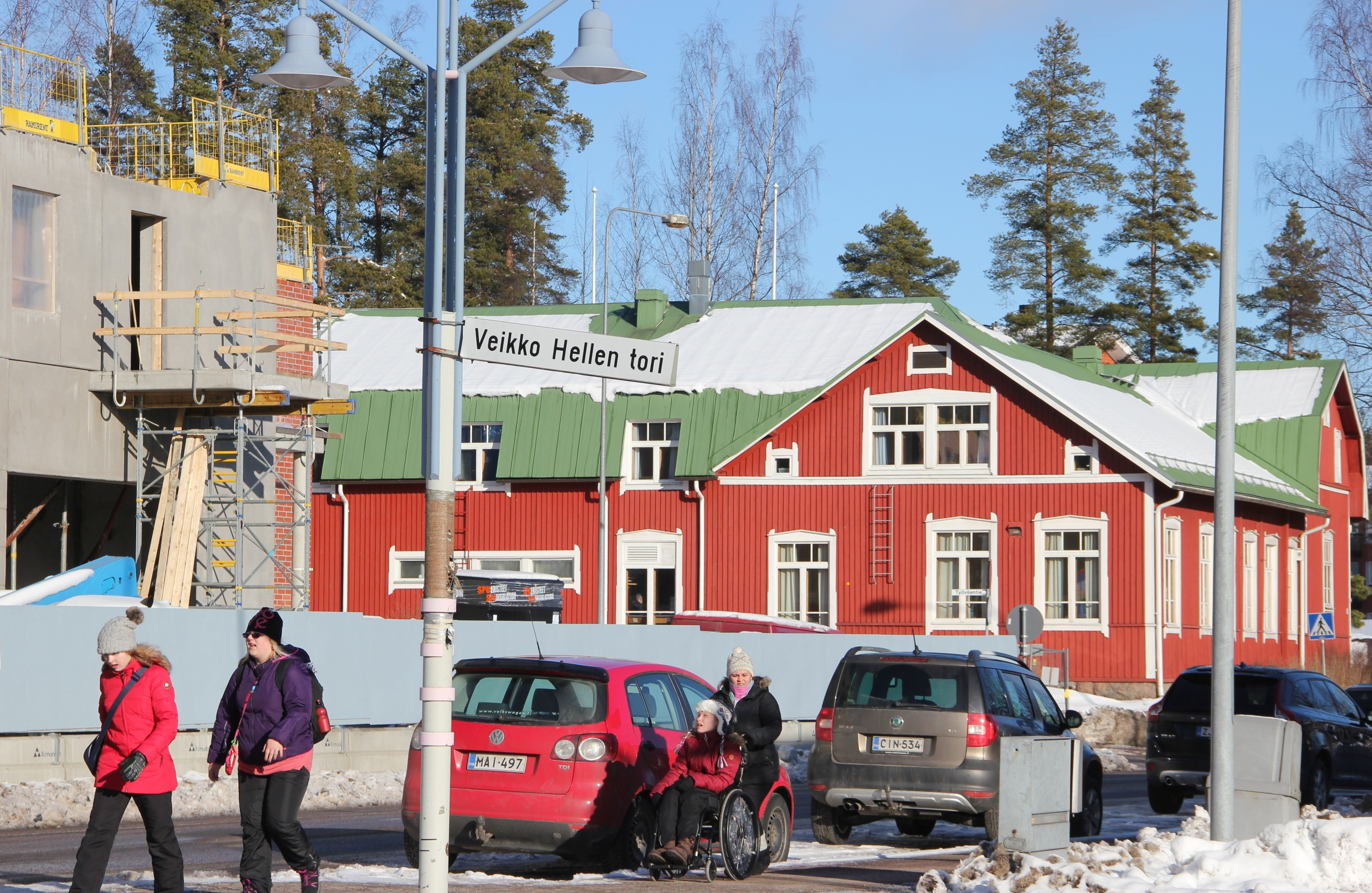 Rientola, Nummelan työväentalo, Nummelan työväenyhdistys Elo – Nummela, Vihti.